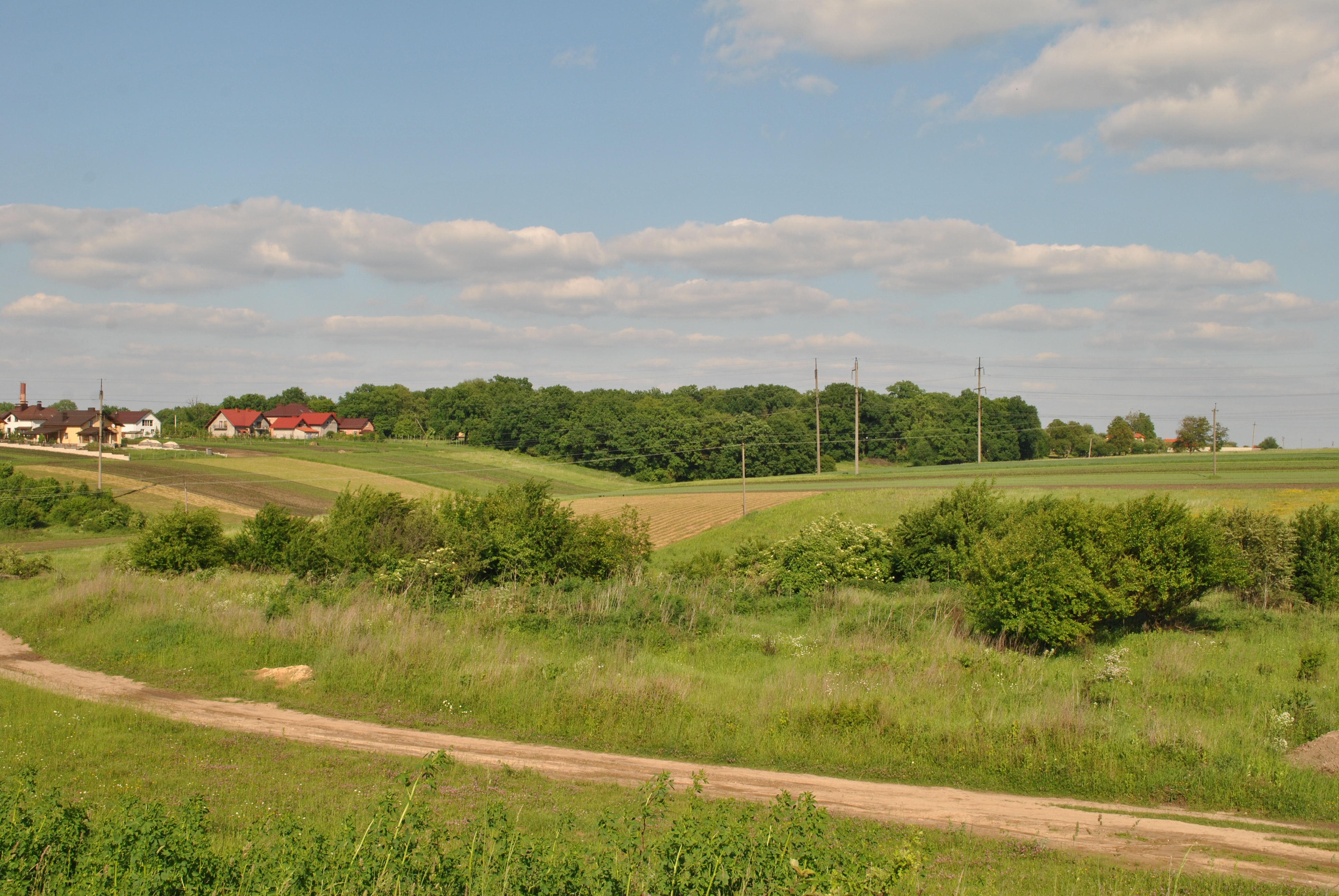 Ландшафтний заказник місцевого значення «Наші гаї» — лісові масиви в межах населеного пункту с. Великі Гаї Тернопільського району Тернопільської області.